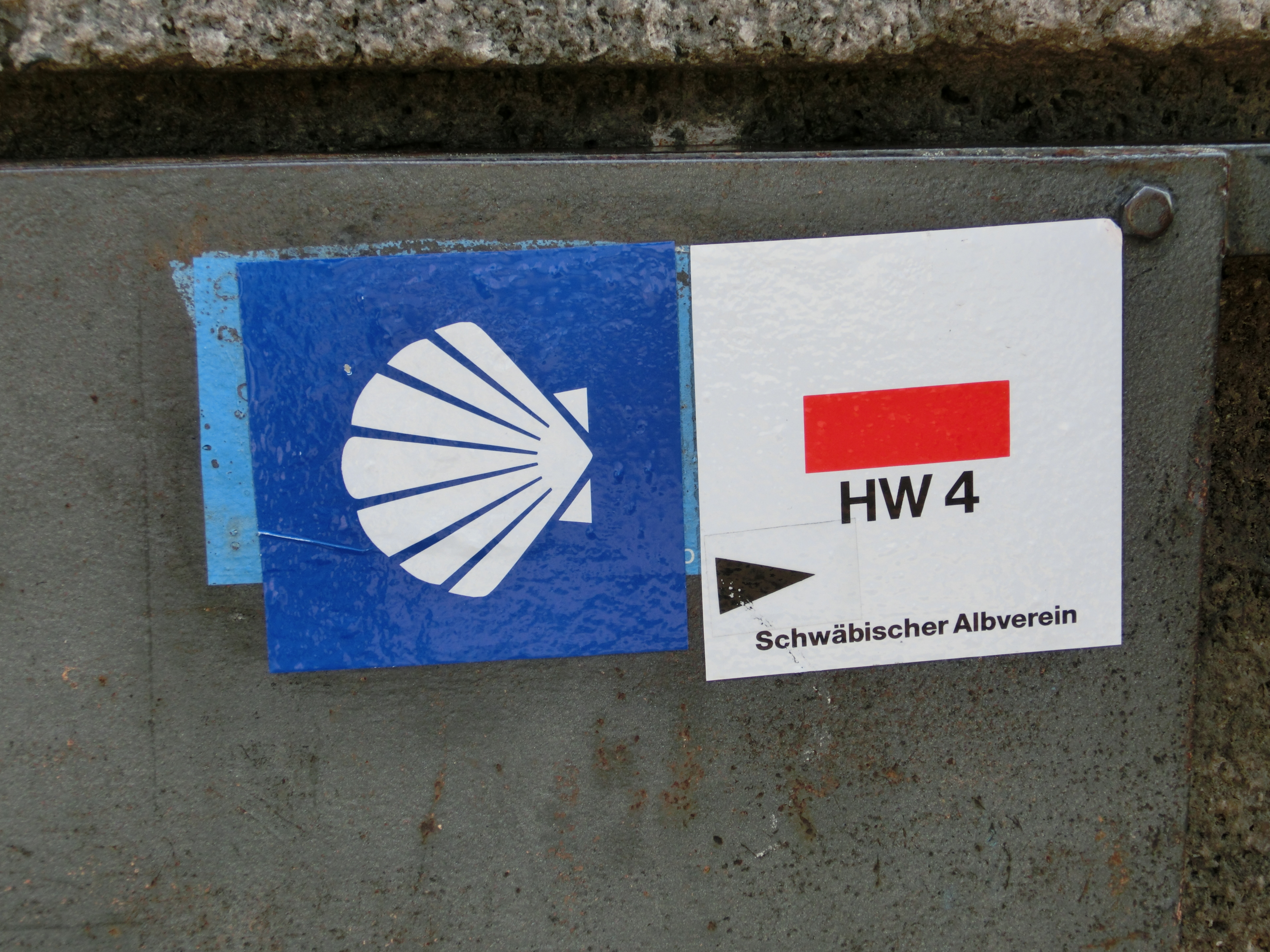 Deutschland - Bayern - Würzburg: Wegzeichen des Jakobswegs und des HW 4 an der Alten Mainbrücke